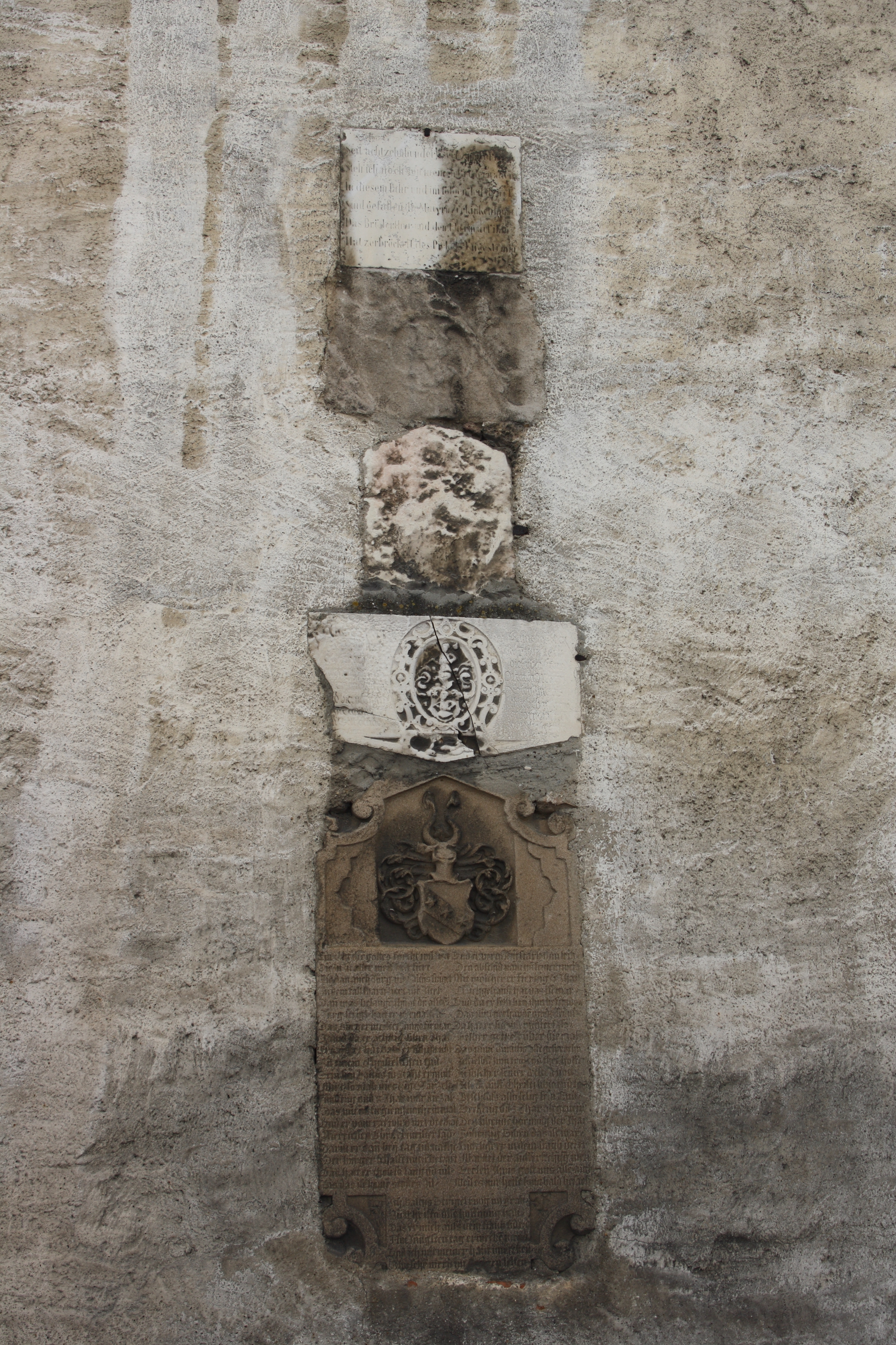 Mauerturm der Stadtbefestigung in Lauingen im Landkreis Dillingen an der Donau (Bayern) am Oberanger, hinter der Stadtpfarrkirche St. Martin